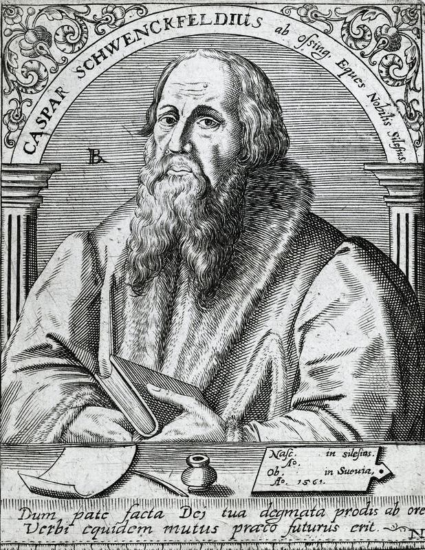 Kupferstich Kaspar Schwenkfeld oder Schwenckfeld, Caspar (1489-1561); Reformator, Theologe, Mystiker